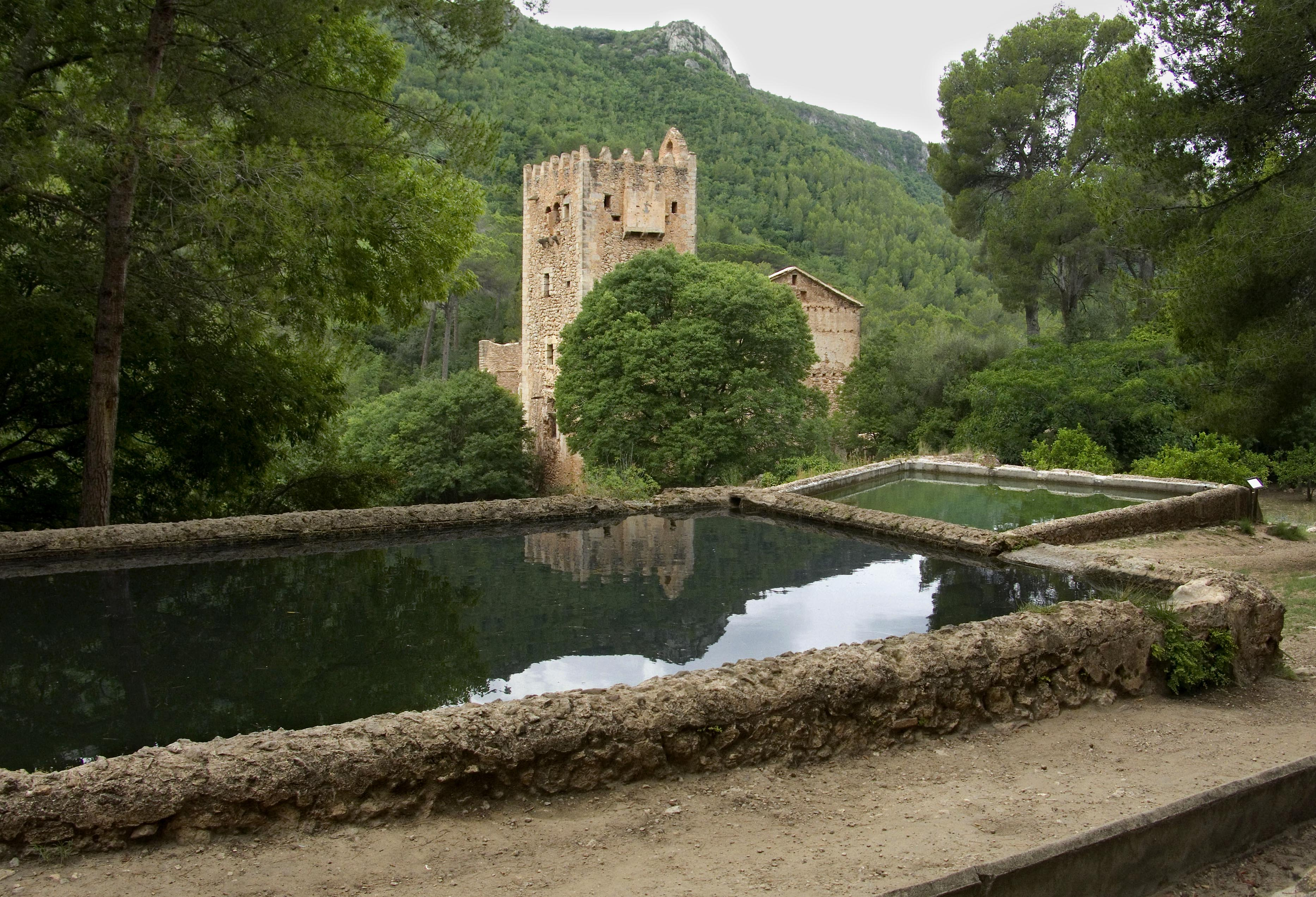 Monestir de monjos jerònims del municipi d’Alzira (Ribera Alta), a la vall de la Murta, País Valencià